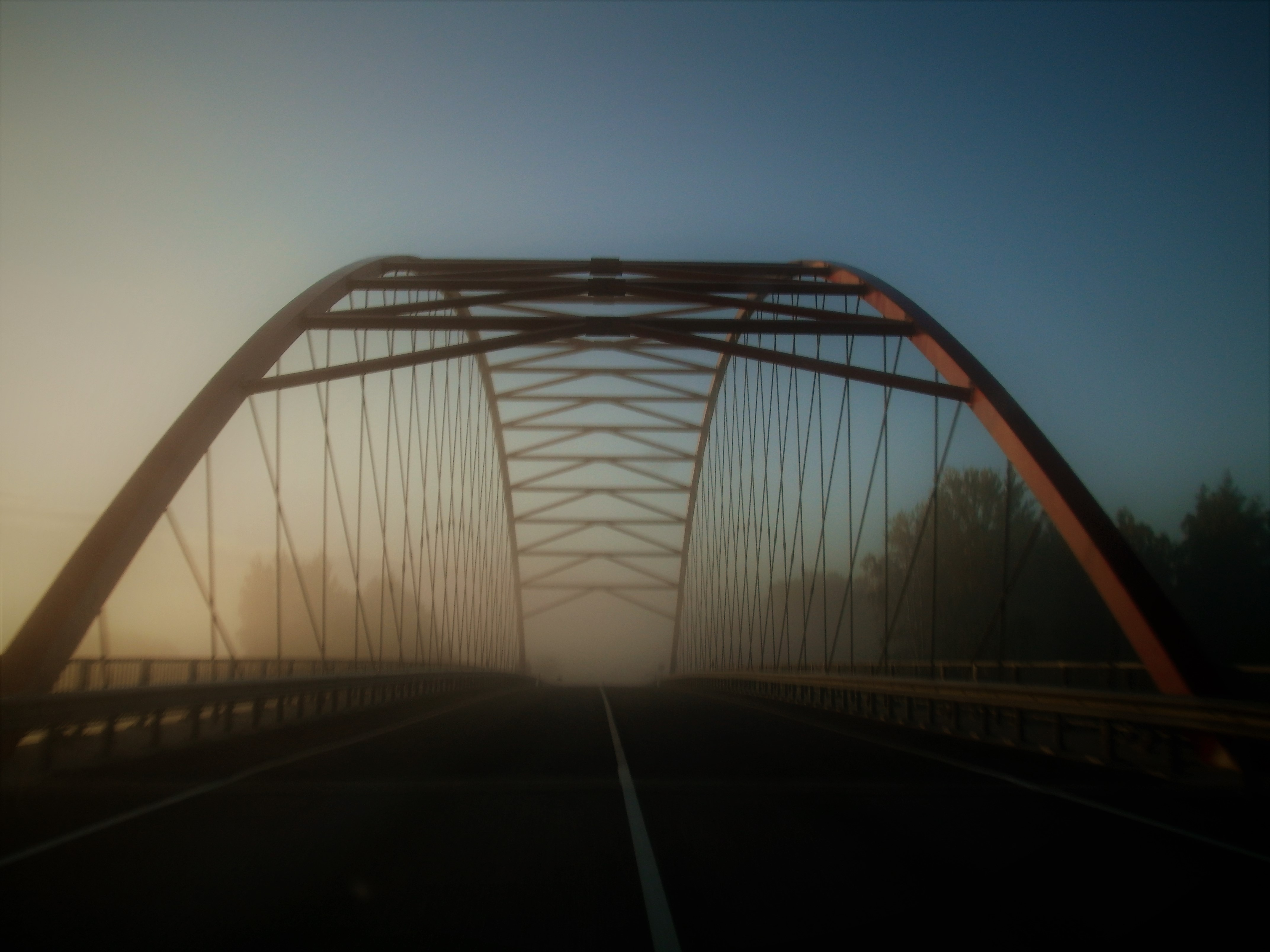 Uus sild üle Emajõe Viljandi-Tartu maanteel nr. 92.